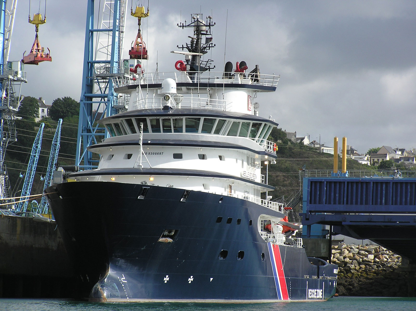 Description : Remorqueur de Haute Mer Abeille Bourbon à quai au port de Brest Place : Brest, Bretagne, France Date : Aout 2005 Auteur : Pline Photo personnelle